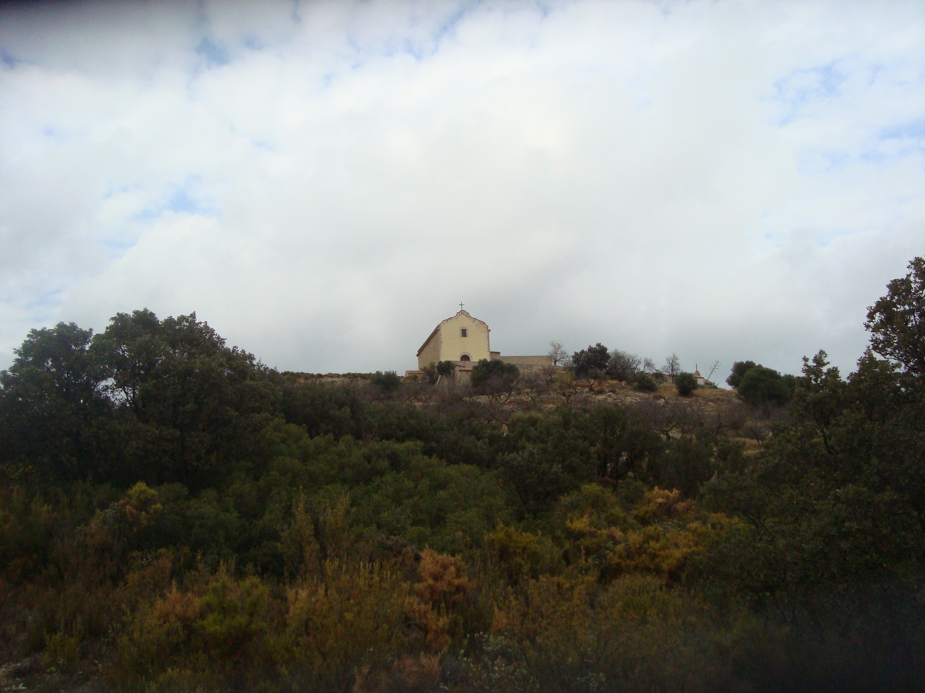 Ermita de Sant Marc, La Barcella, Xert